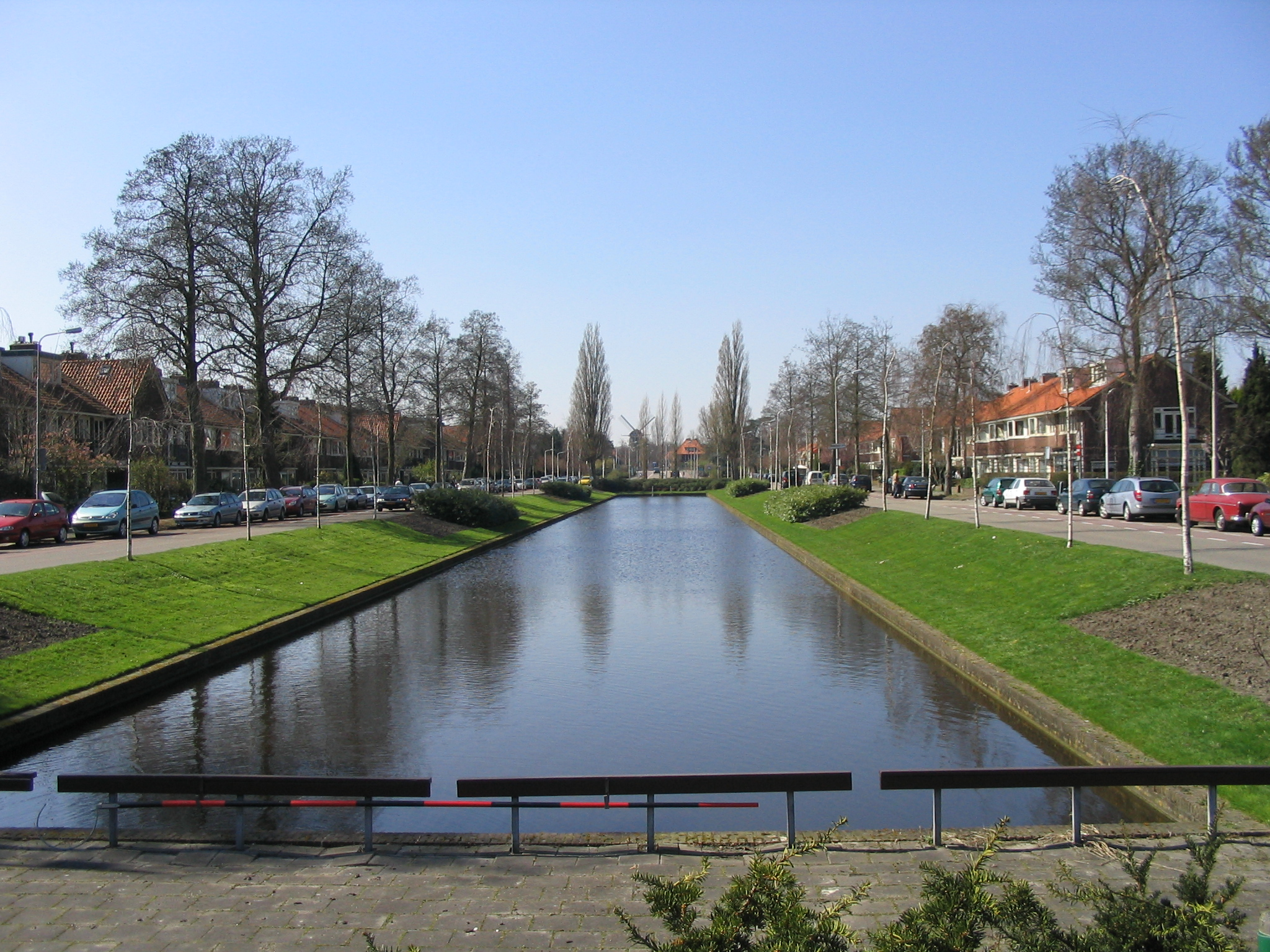 Amstelveen